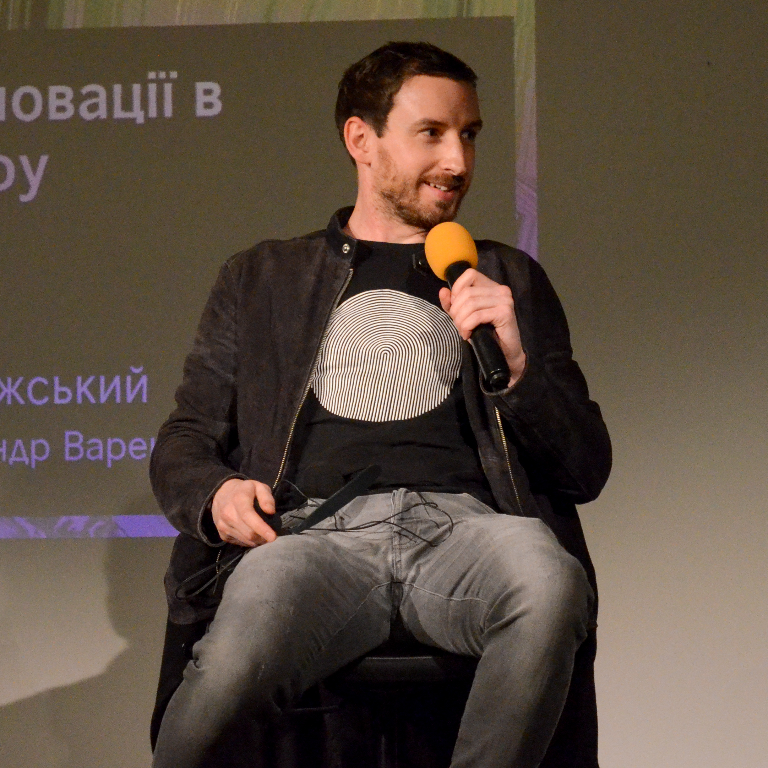 Другий музичний форум The Selector Pro в Києві. Панель "Візуальні інновації в музичних шоу", Макс Купер